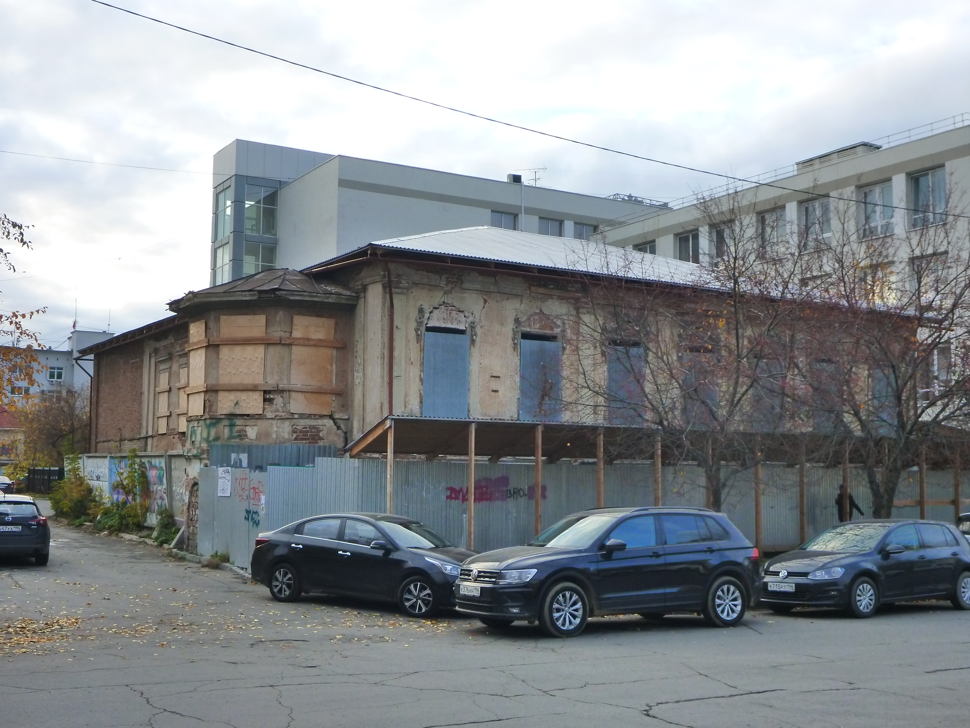 Особняк Ф.Л. Миллера в Екатеринбурге (ул. Шейнкмана, 18). Построен в середине XIX века. В 1920-е годы передан мусульманской общине Свердловска, которая его перестроила и использовала как молитвенное здание, а также для театра "Мусульманский очаг Урала". Далее изъят у общины. Вид 2019 года